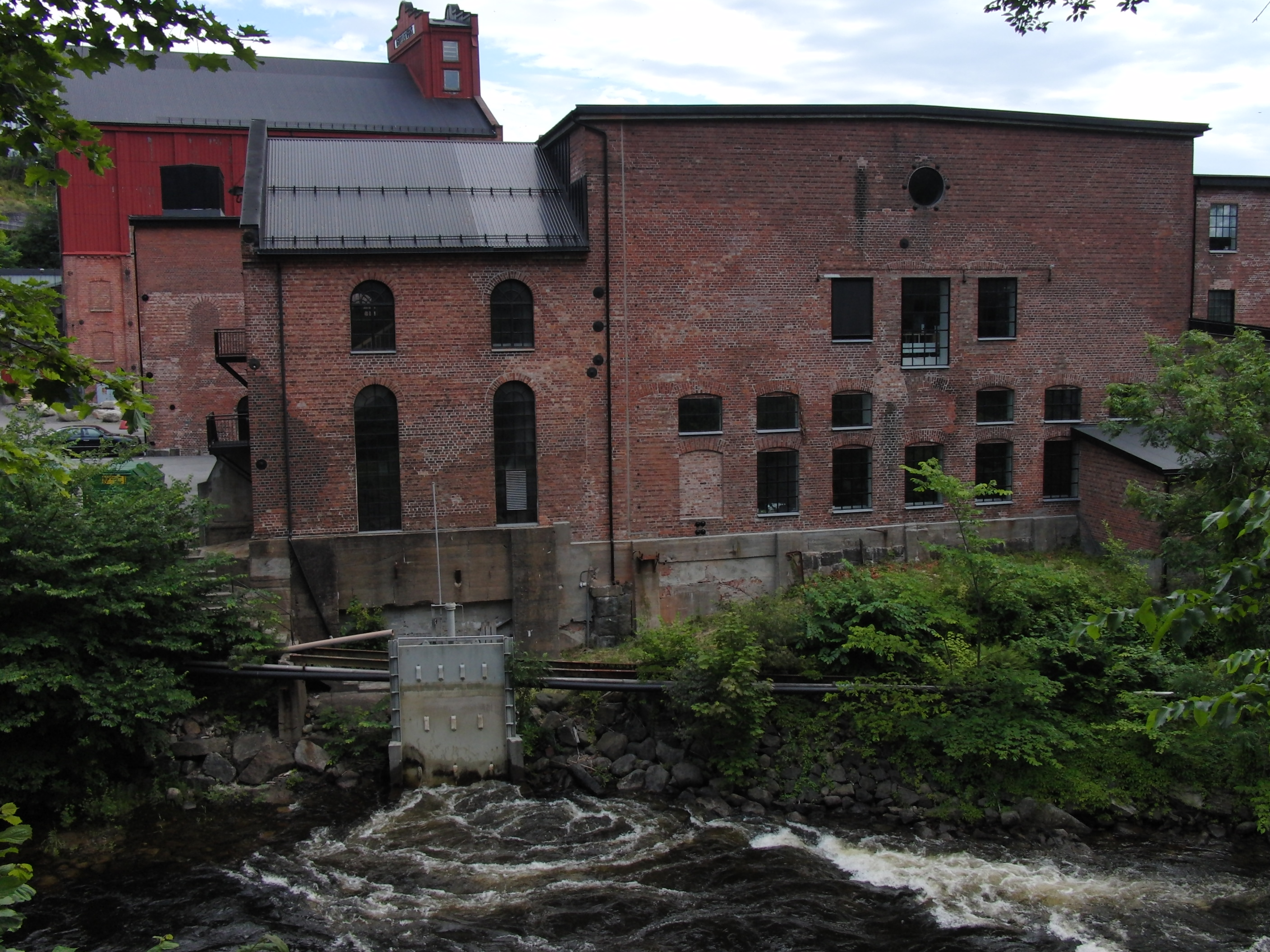 Fritzøe kraftverk bygg "B"